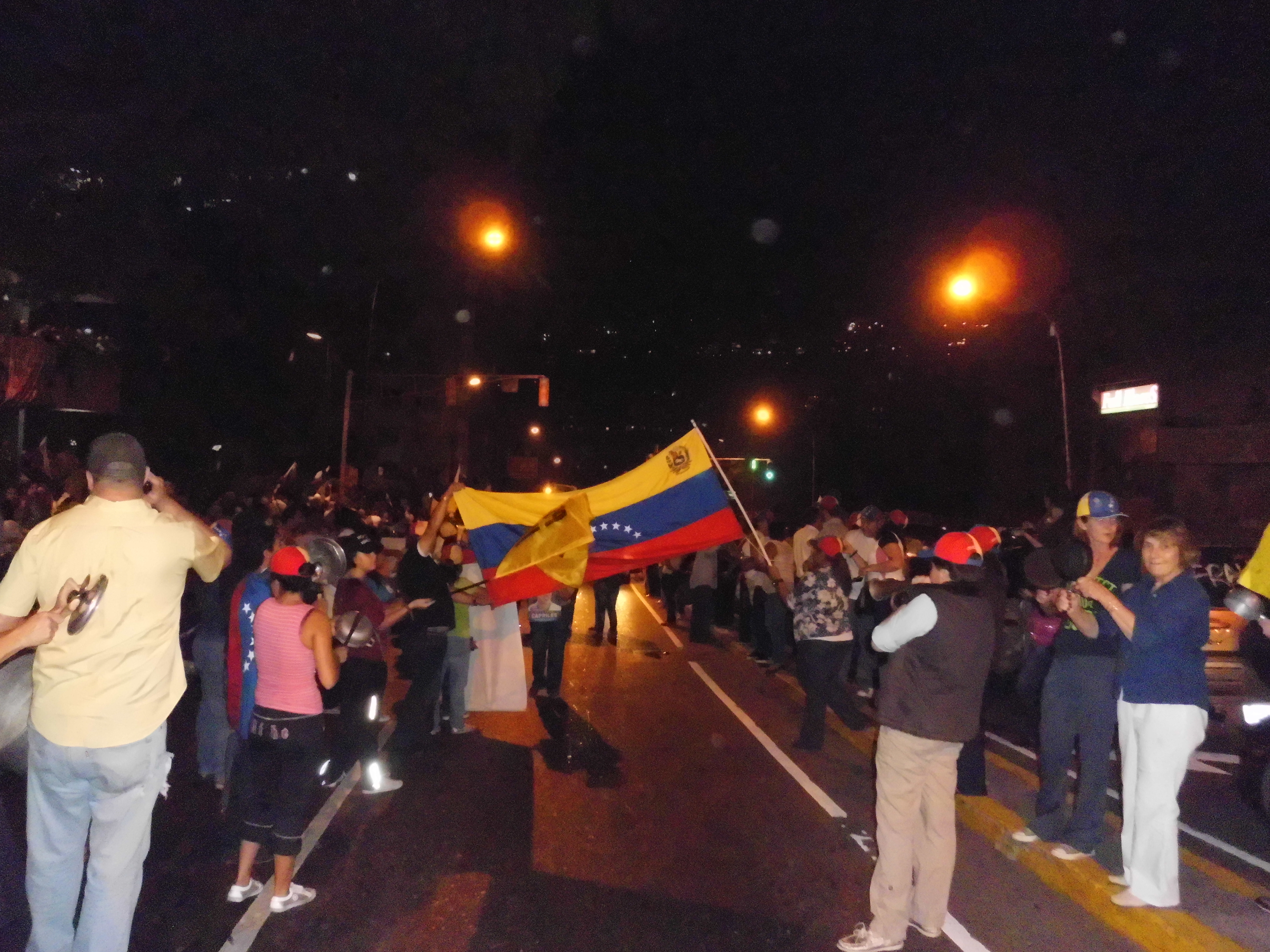 Cacerolazo contra Nicolás Maduro - La Boyera Municipio el Hatillo, Estado Miranda Venezuela día 15 de abril de 2013 hora 8:30 a 9:30 pm